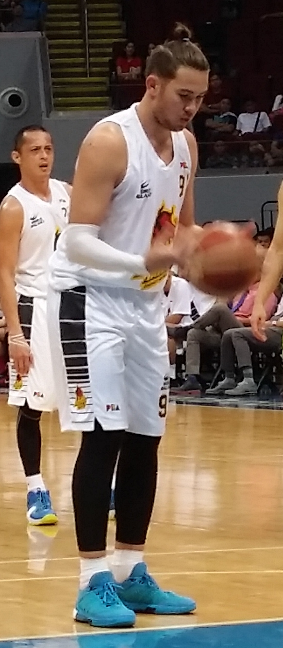 PBA - Globalport vs Barako Bull - Rodney Brondial-Barako Bull - 2015-1225